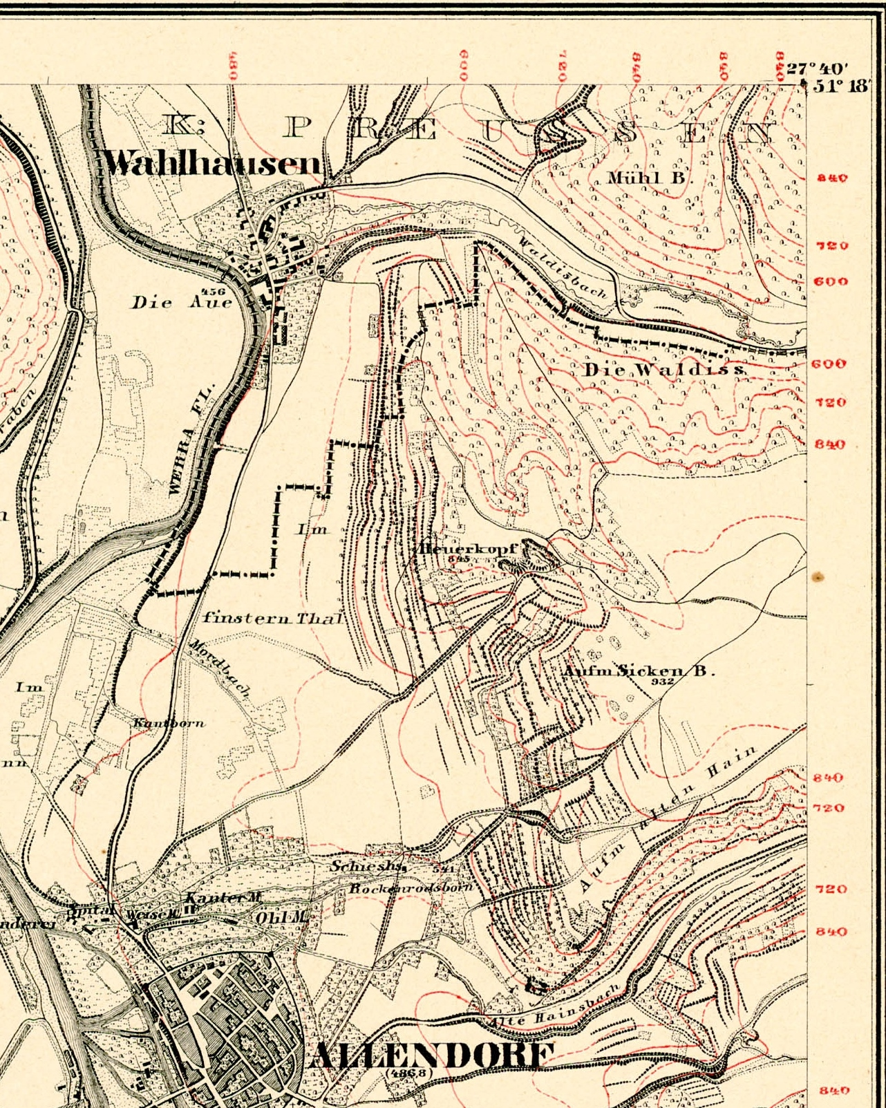 Historische Kartenwerke (1:25000) des Kurfürstenthum Hessen, Blatt 25 Allendorf: Allendorf und Wahlhausen im Werratal